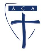 Escudo de Acción Catolica